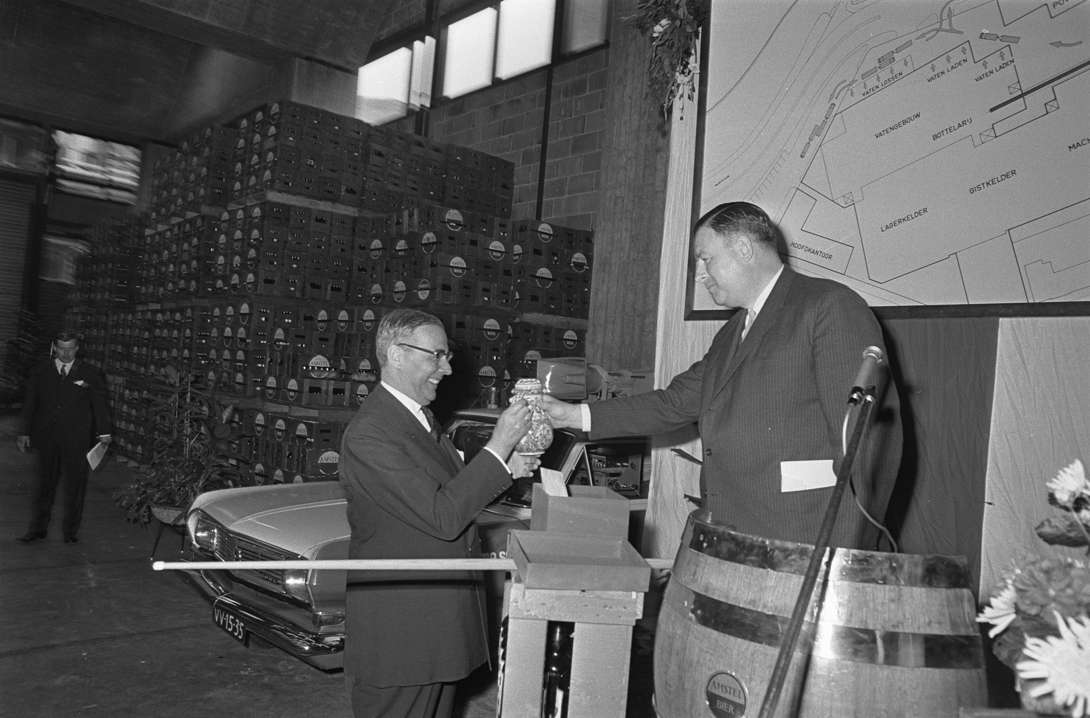 Collectie / Archief : Fotocollectie Anefo Reportage / Serie : [ onbekend ] Beschrijving : Burgemeester Van Hall opende nieuwe expeditieruimte bij Amstelbrouwerij, Burgemeester Van Hall Datum : 24 mei 1967 Trefwoorden : brouwerijen, burgemeesters, openingen Persoonsnaam : Amstelbrouwerij, Hall, Gijs van Fotograaf : Nijs, Jac. de / Anefo Auteursrechthebbende : Nationaal Archief Materiaalsoort : Negatief (zwart/wit) Nummer archiefinventaris : bekijk toegang 2.24.01.05 Bestanddeelnummer : 920-3436